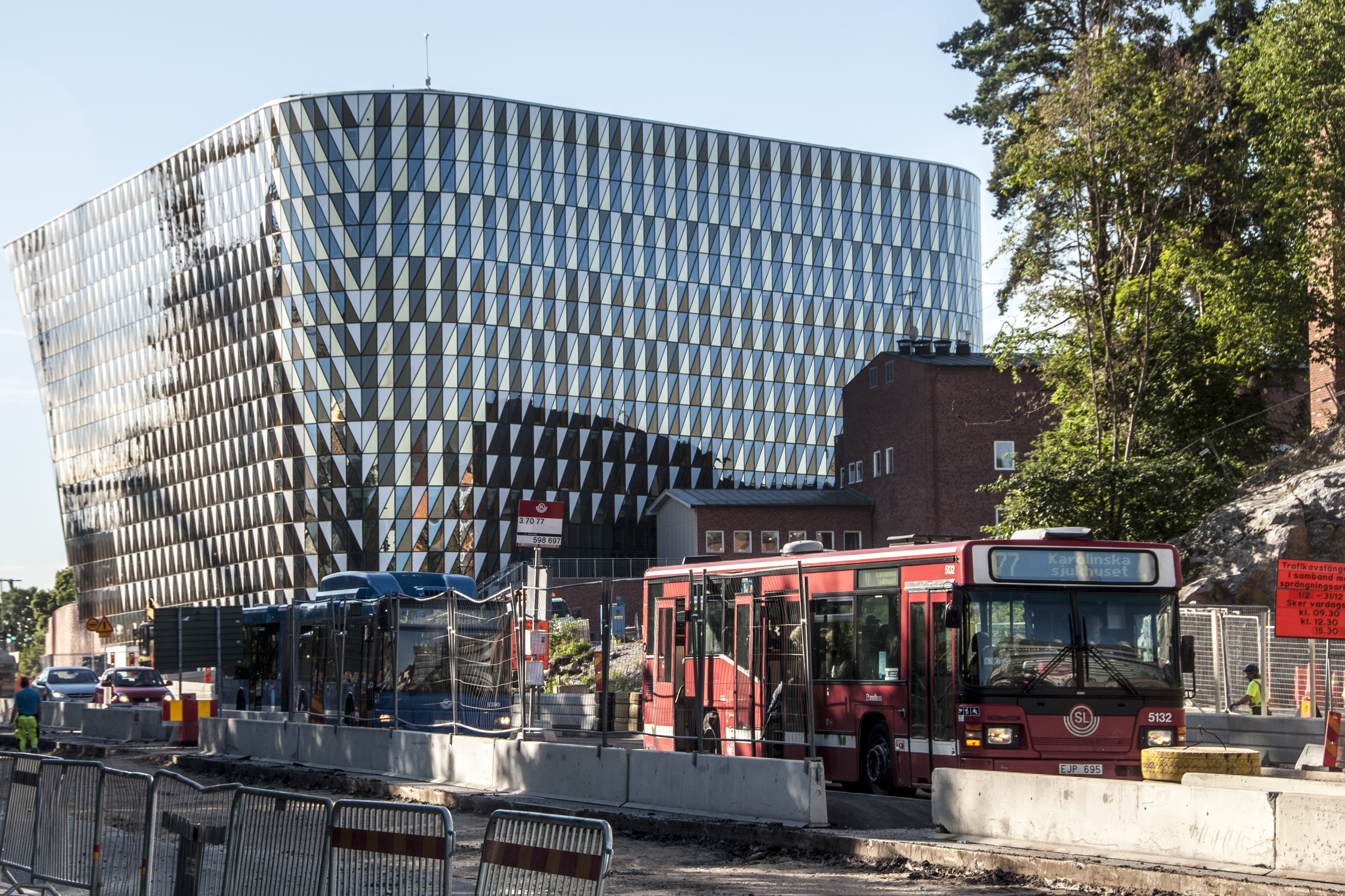 Aula Medica, till höger tomten för blivande "Biomedicum"